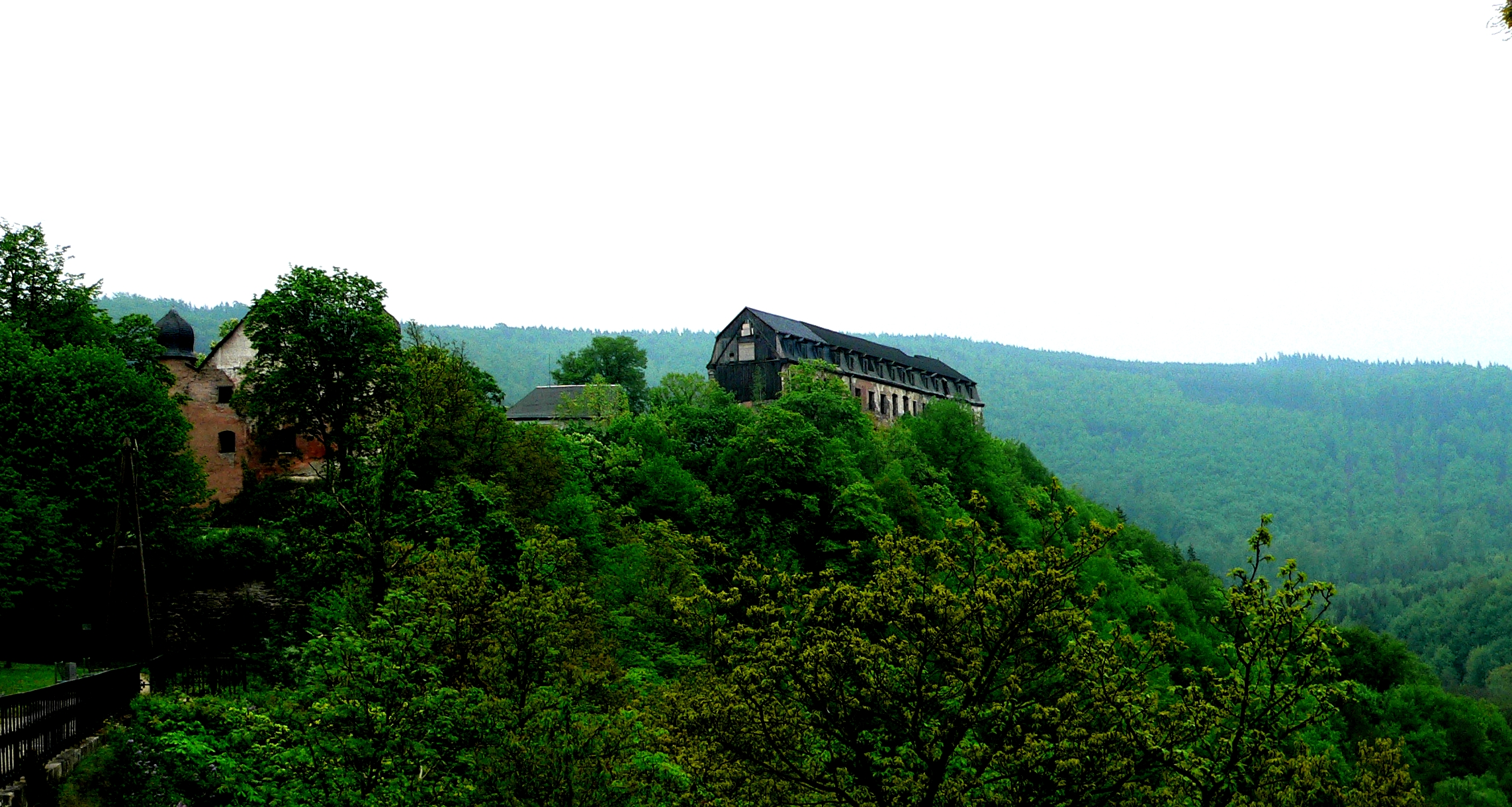 Castle Schwarzburg on River Schwarza in Thuringia, Germany Die Schwarzburg über dem Schwarzatal im thüringischen Schiefergebirge